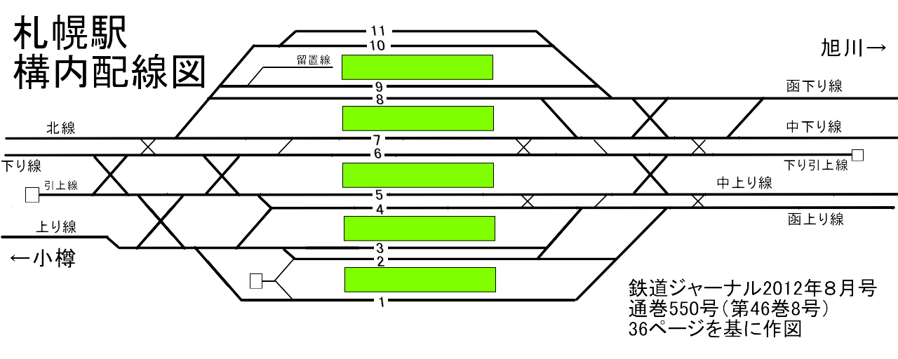 札幌駅構内配線図（2012年春頃）